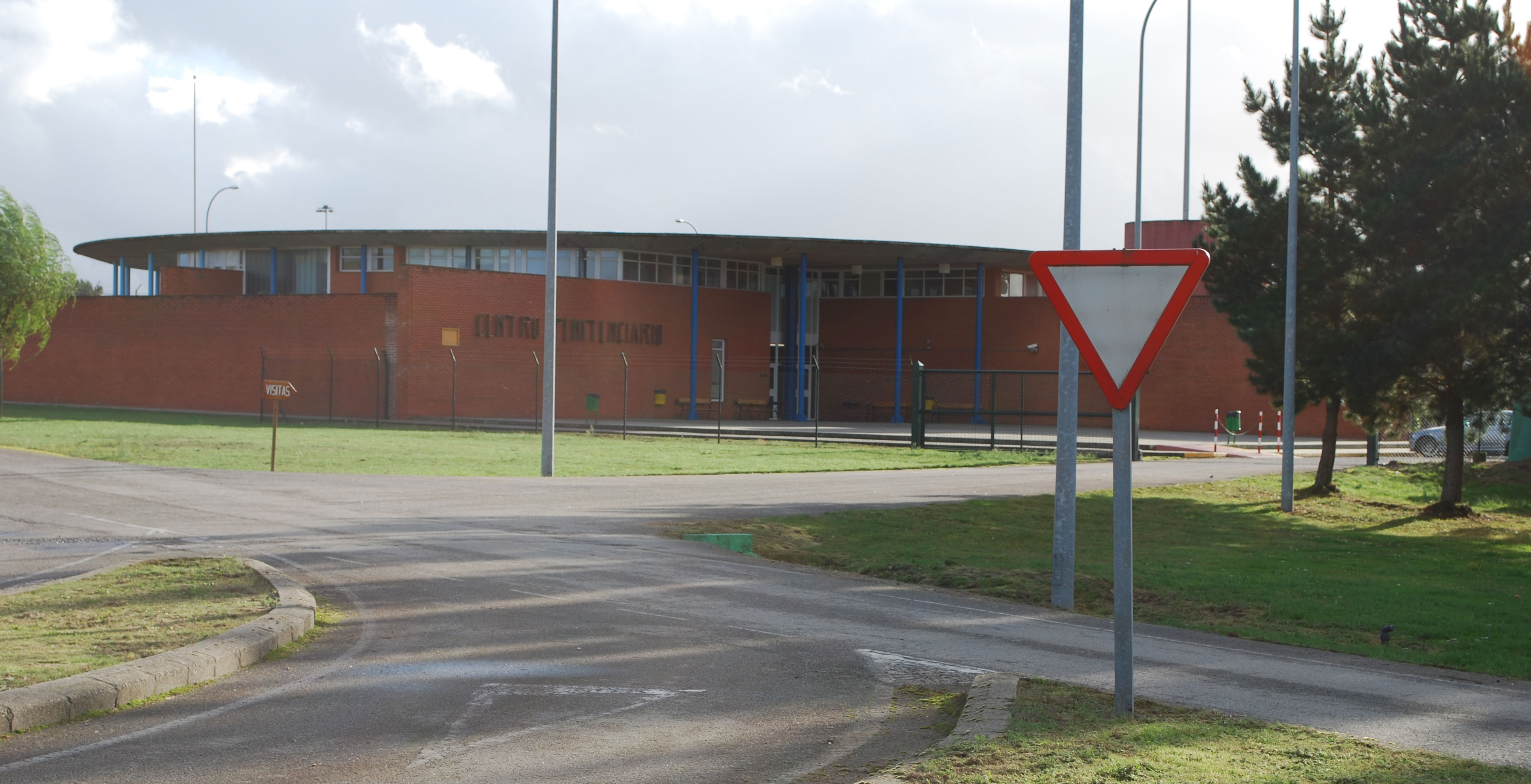 Porta do centro penitenciario de Teixeiro, A Coruña Galiza Spain